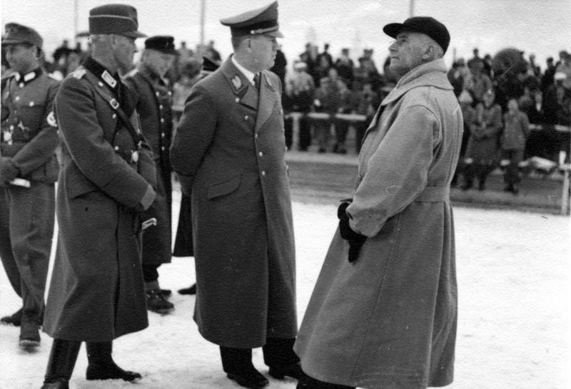 Skimeisterschaften Kitzbühel 1939 Ehrengäste ... Hofer, Frick